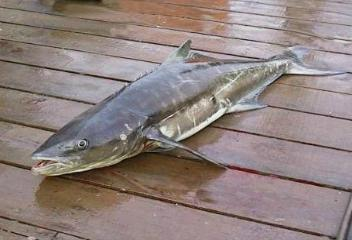 海鱺魚